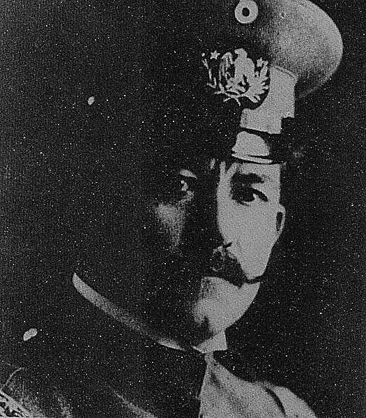 General Francisco Murguía